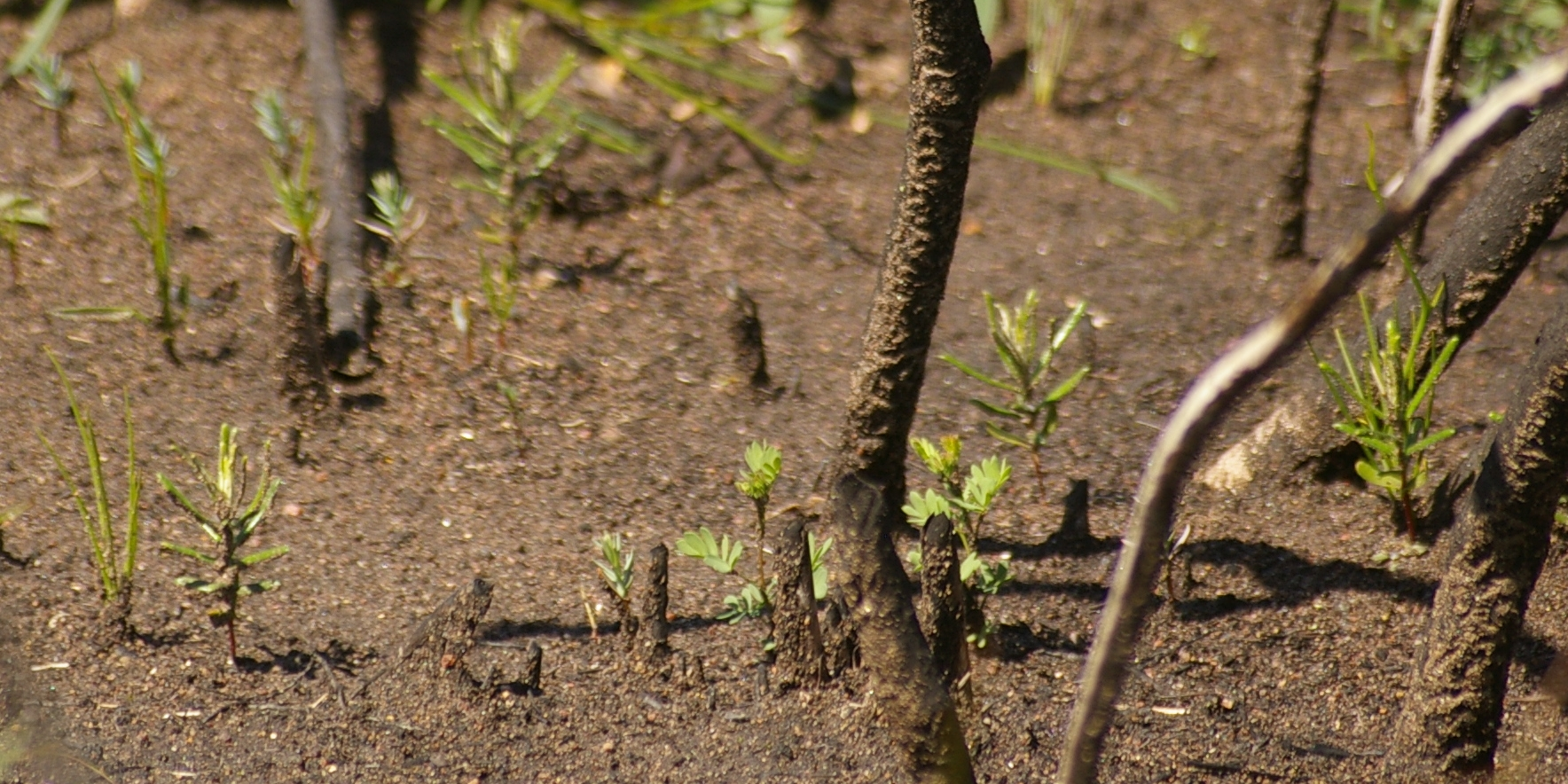 Banksia telmatiaea seedlings